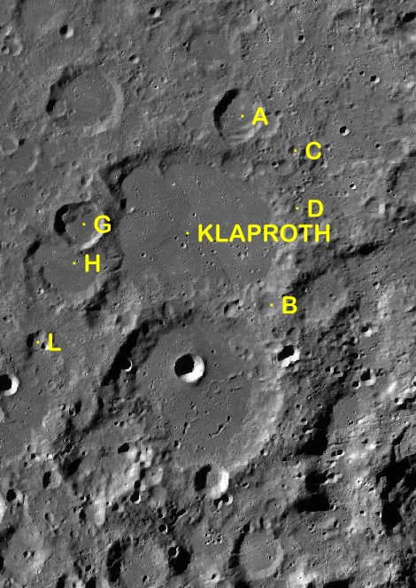 Cráter lunar Klaproth. Cráteres satélite. (Imagen LRO)